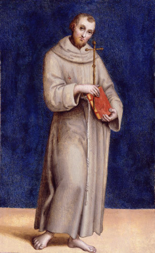 São Francisco de Assis